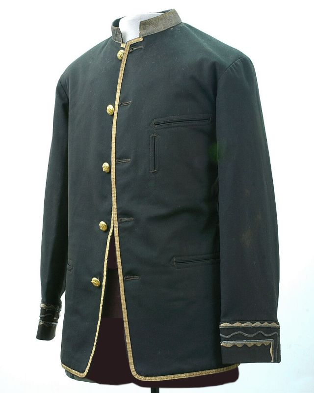 Jas. Teuku Umar (1840-1899) is een van de grootste verzetshelden uit de Indonesische geschiedenis. Hij bestreed tijdens de oorlog in Atjeh aanvankelijk de Nederlanders, maar koos in 1893 hun kant. Hij won het vertrouwen van de Nederlanders, maar was feitelijk bezig om zijn eigen machtspositie te versterken. In 1896 deserteerde hij en nam manschappen en wapens mee om de Nederlanders weer te bestrijden. Hij werd uiteindelijk in 1899 in een hinderlaag gelokt en gedood. In een groot aantal Indonesische steden zijn er straten naar hem vernoemd. Hij noemde zich Teukoe Oemar Djohan, Johan de heldhaftige. Zijn titel luidde ook wel: Teukoe Djohan Pahlawan Panglima Prang Besar Gouvernement of te wel Johan de heldhaftige, de grote heldenstrijder van het Gouvernement. Het jasje is in 1930 door de zoon van Teuku Umar: Teuku Raja Lehman geschonken aan de voormalige eigenaar de heer F.W. Stammeshaus. Laken staatsiejas toebehoord aan Teuku Umar Djohan